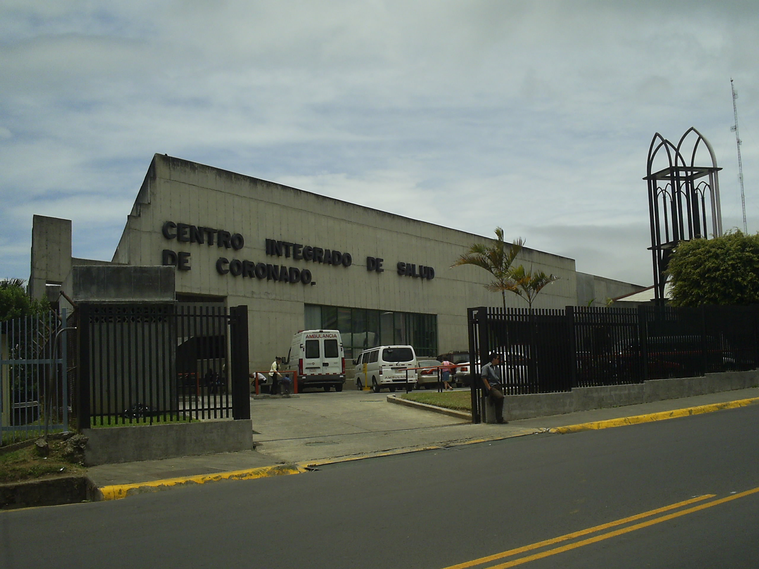 Centro Integrado de Salud de Coronado